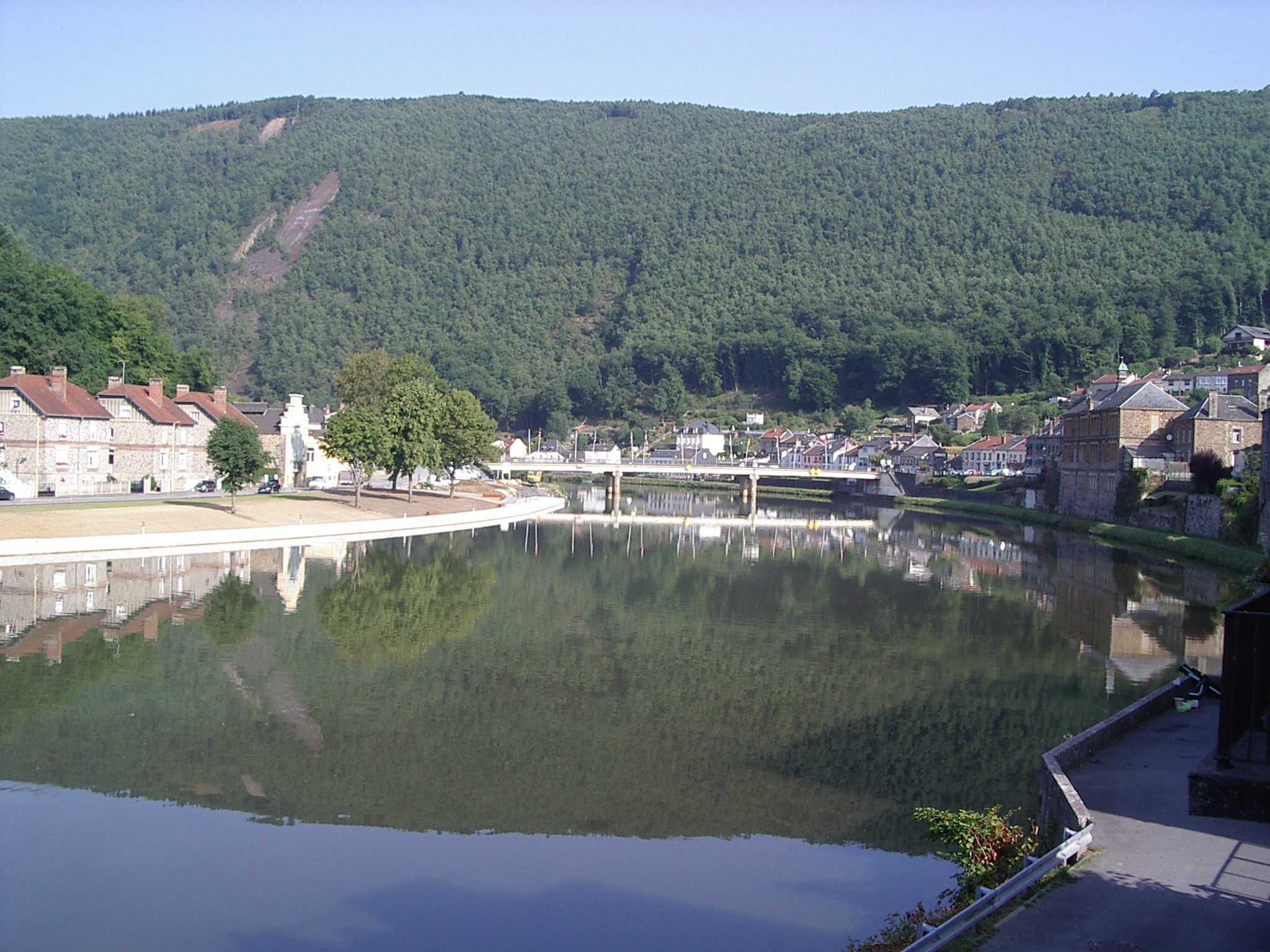 Vue de la Meuse à Monthermé, Departement des Ardennes